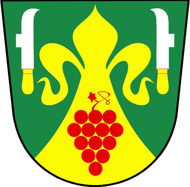 Znak obce Malešovice